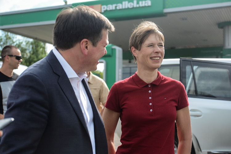 Робочий візит у Донецьку область Президента Естонії Керсті Кальюлайд і Віце-прем’єр-міністра України Геннадія Зубка. 24 травня 2018 року Президент Естонії пані Керсті Кальюлайд і Віце-прем’єр-міністр – Геннадій Зубко відвідали Донеччину.